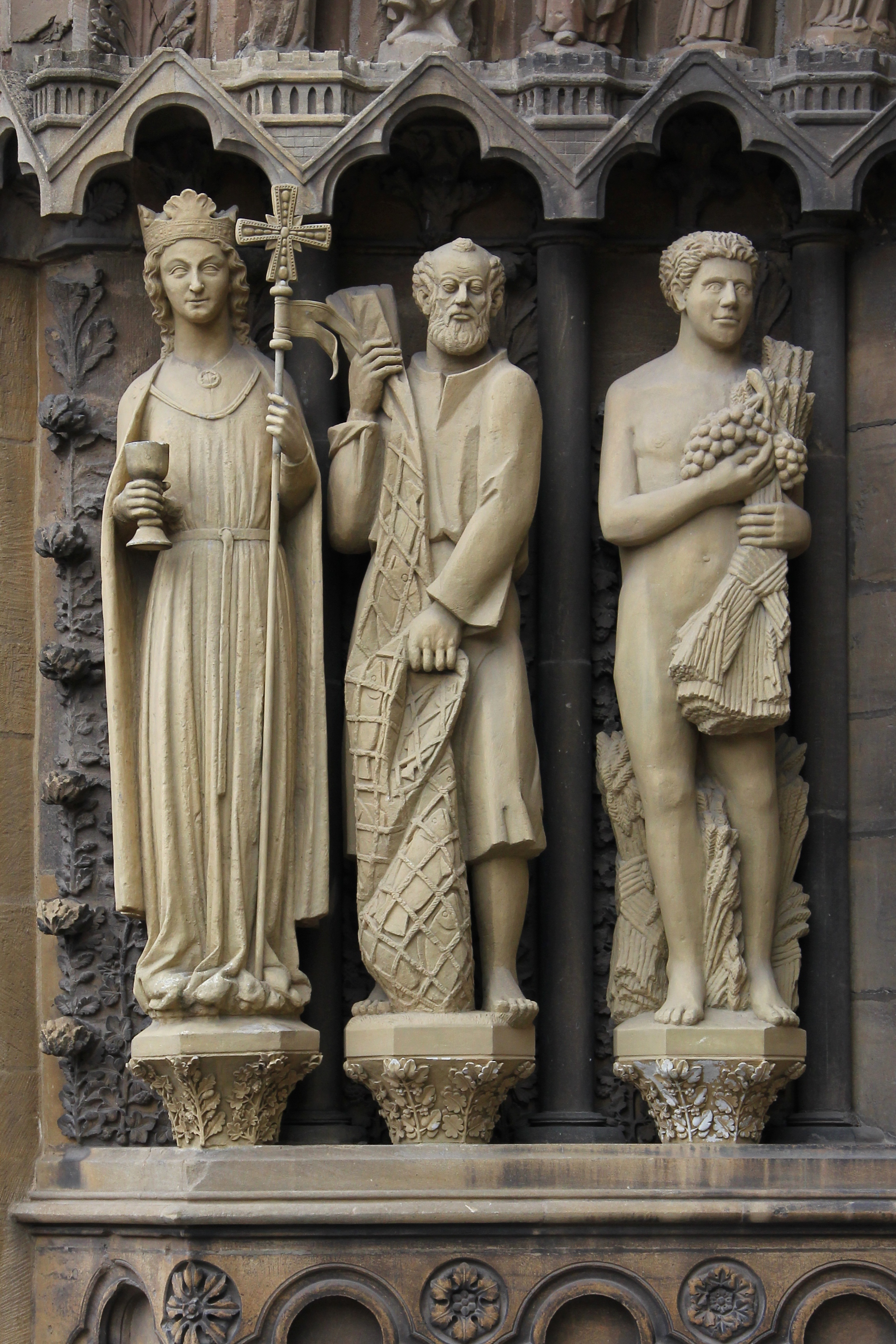 Westportal der Liebfrauenkirche in Trier: Ecclesia als Symbol des christlichen Evangeliums, Petrus mit dem Fischernetz (statt der üblichen Schlüssel) und Adam. Die Statue der Ecclesia ist ein Abguss des im Museum befindlichen Originals. Die beiden anderen Figuren waren im Zuge der Säkularisation zu Beginn des 19. Jahrhunderts verloren gegangen. Die jetzigen Statuen sind 1991/92 geschaffene Neuschöpfungen der Bildhauer Theo Heiermann (Petrus) und Elmar Hillebrand (Adam). Die Figuren sind etwa 1,80 Meter groß.